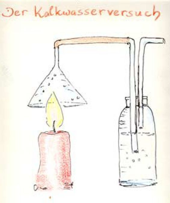 Kohlenluft, Lehrstück Faradays Kerze, Susanne Wildhirt